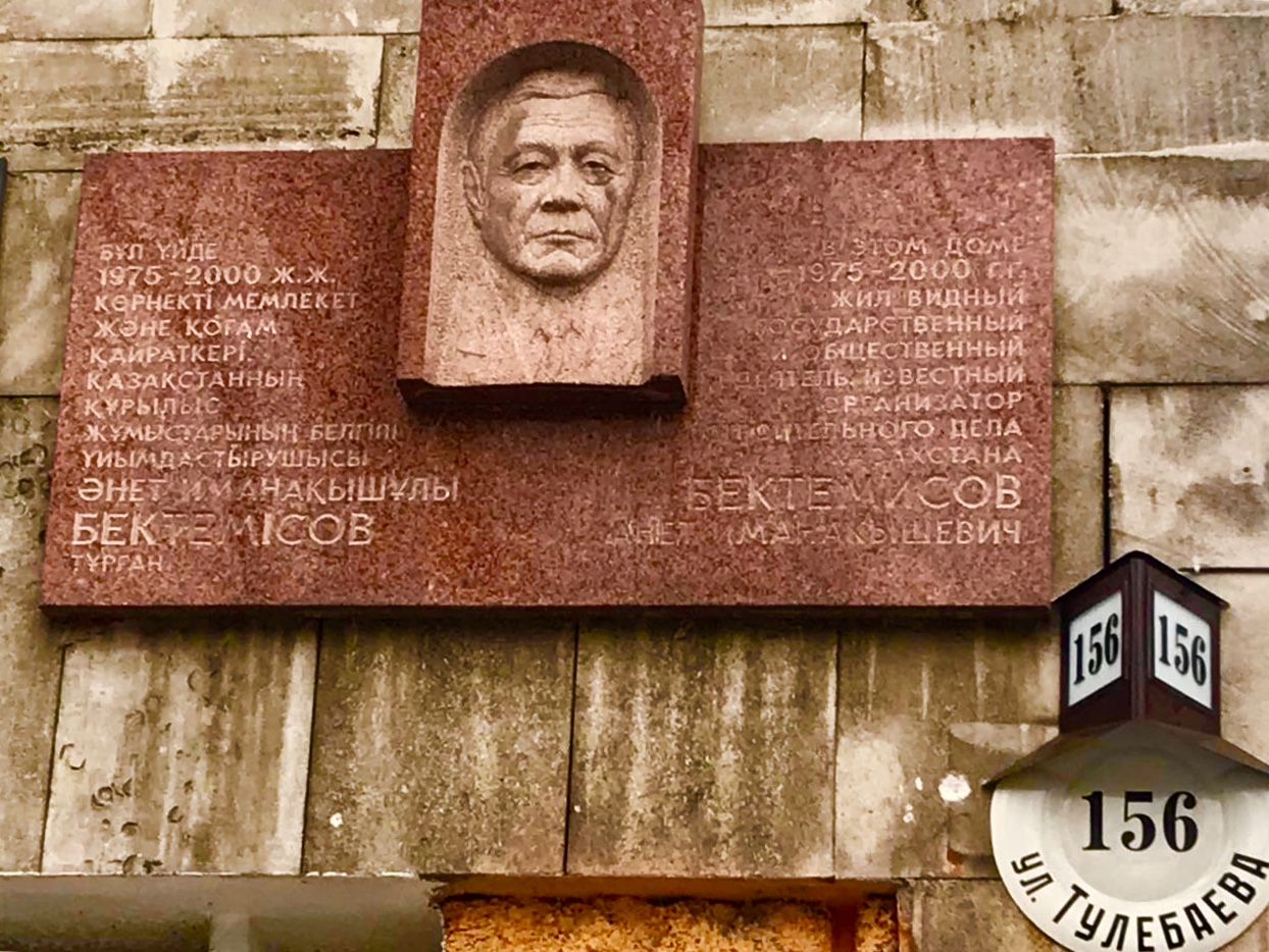 Memorial (A.Bektemisov)